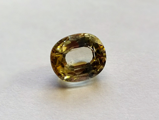 Facettierter, weingelber Zoisit (1,44ct) aus Tansania